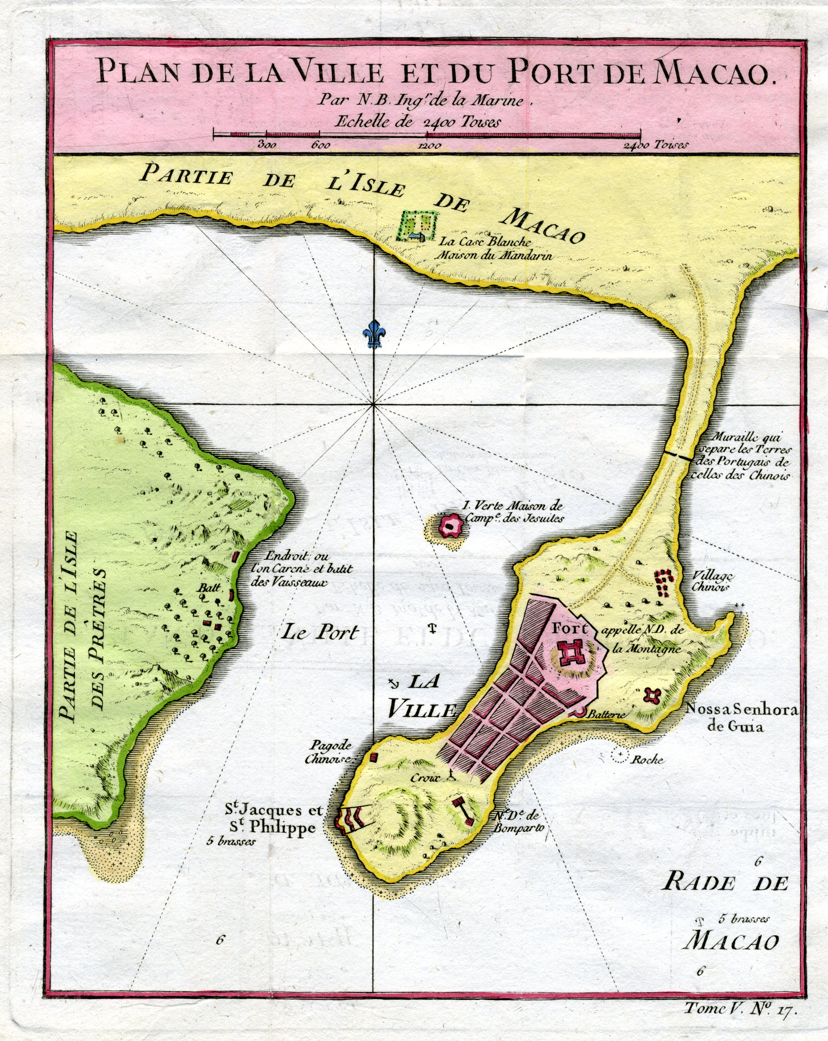 plan_de_la_ville_et_du_port_de_Macao, gravure couleur du XVIIIéme siècle